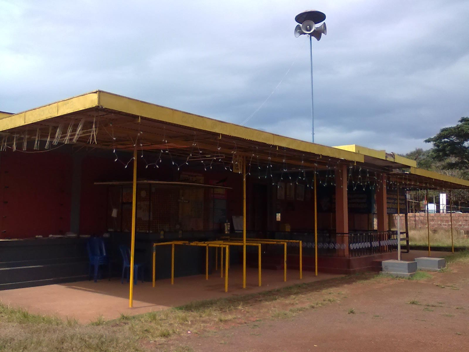 ആദികടലായി ശ്രീകൃഷ്ണ ക്ഷേത്രം